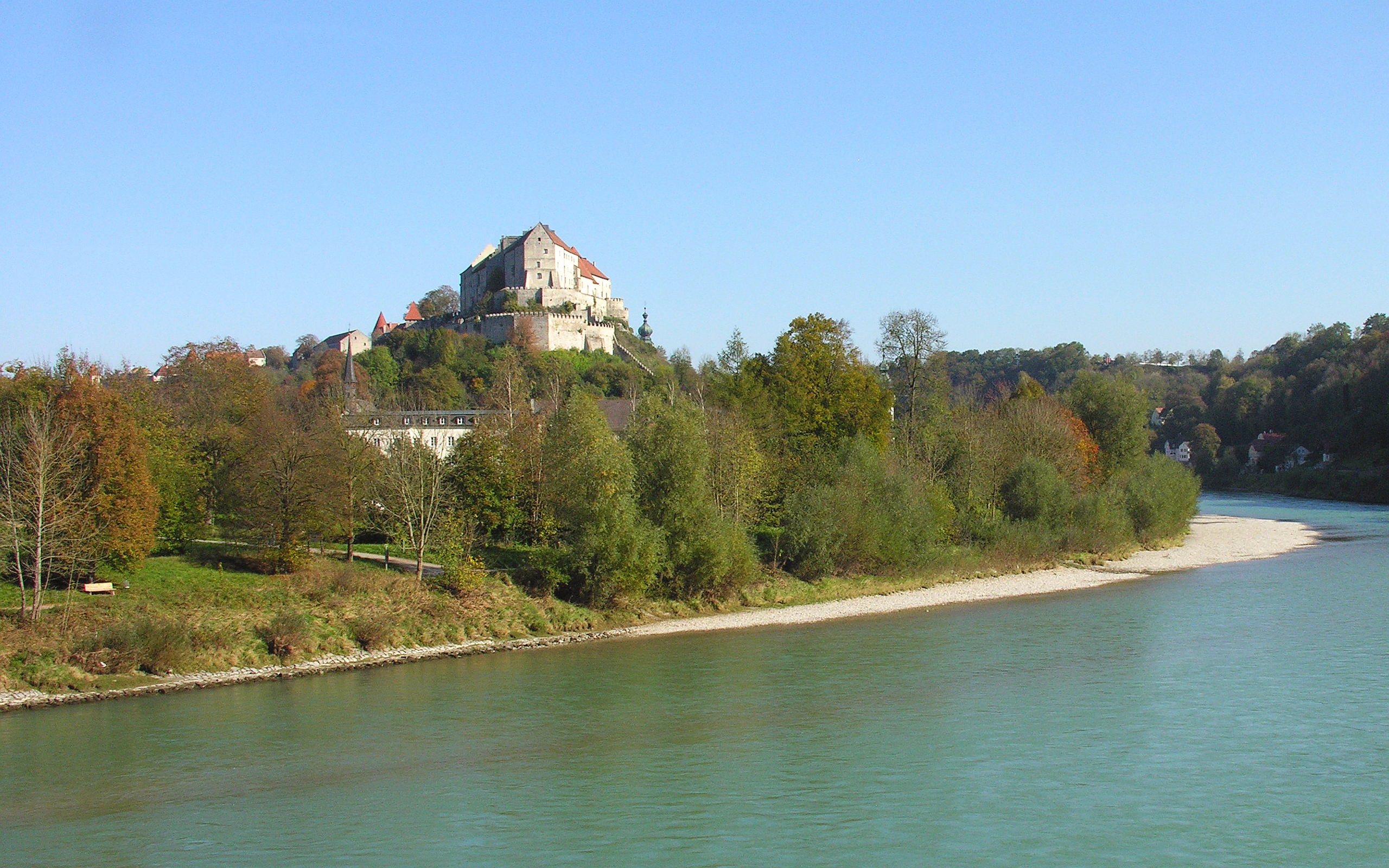 Die Burg von Burghausen in der Südwest-Ansicht oberhalb vom Ort Burghausen an der Salzach, die die Grenze zu Österreich bildet. Foto Wolfgang Pehlemann IMAG3474